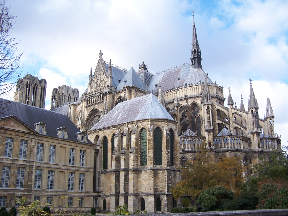 Cathédrale Notre-Dame de Reims